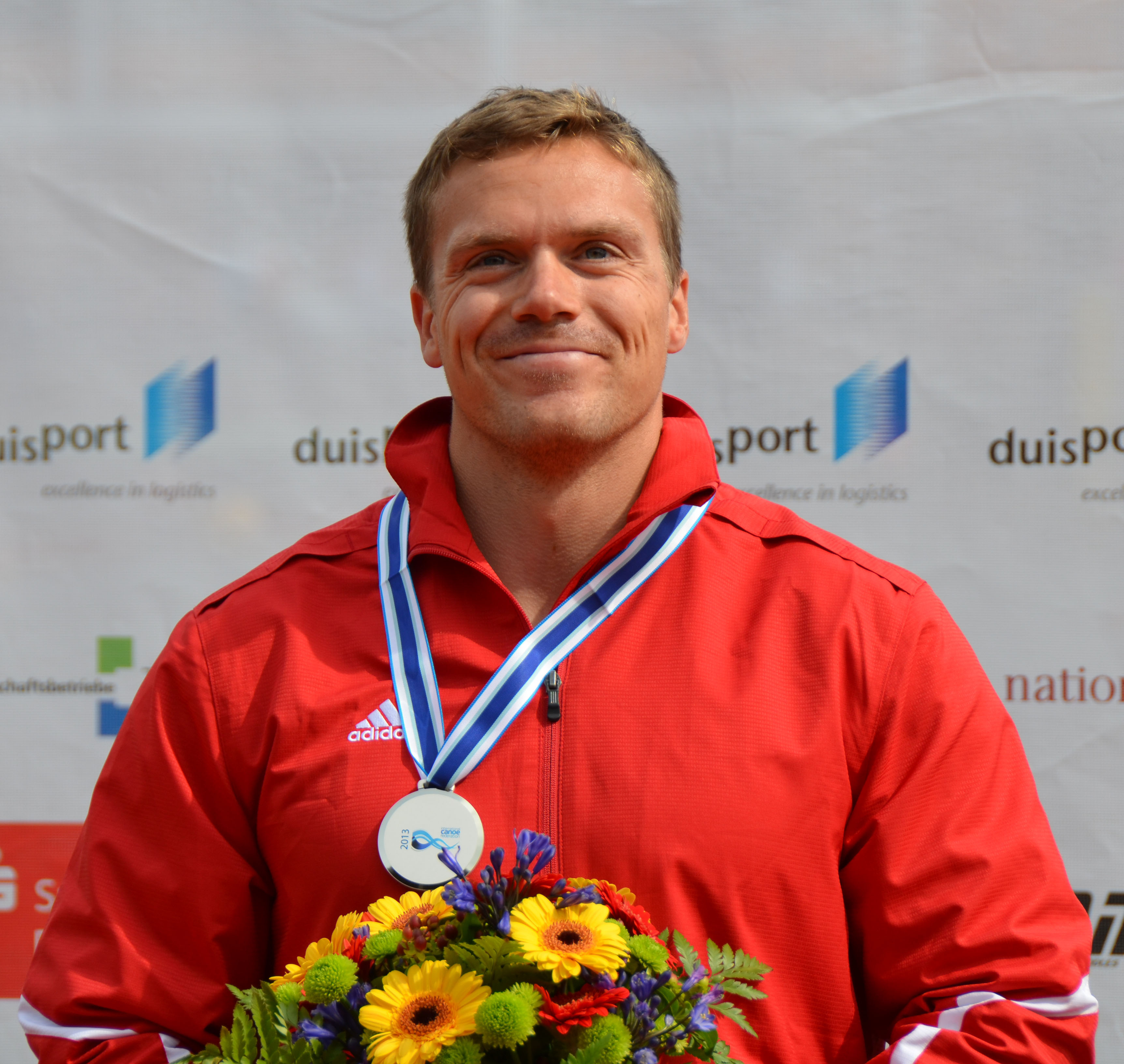 2013 ICF Canoe Sprint World Championships in Duisburg - Alle Ergebnisse/Teilnehmer unter: Gewinner:SWE - SWEDEN ÖSTRÖM, Petter CAN - CANADA DE JONGE, Mark ESP - SPAIN CRAVIOTTO RIVERO, Saúl